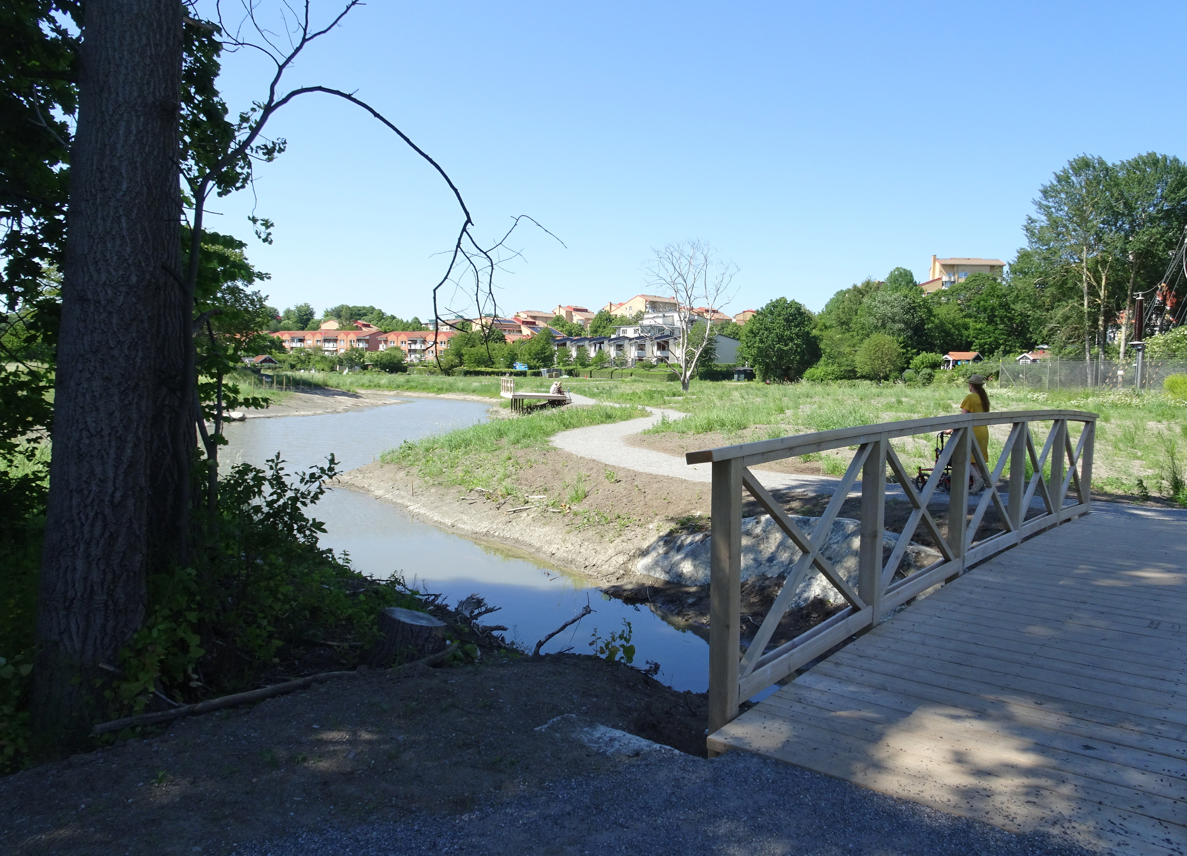 Nya dammar och våtmarker i Tivoli